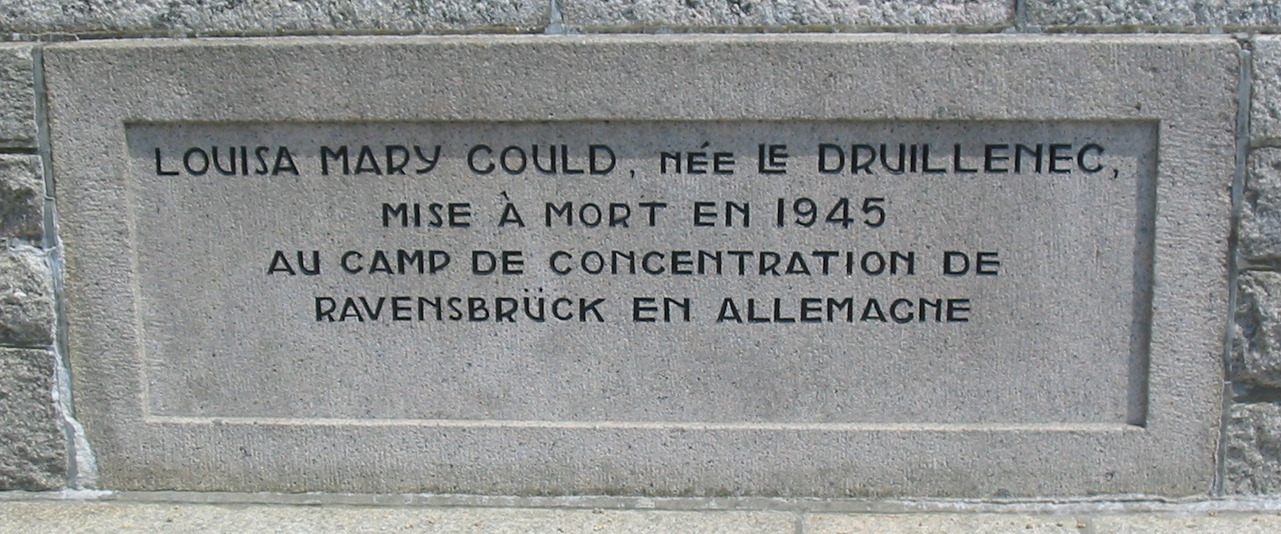 Plaque on war memorial, St Ouen, Jersey, to Louisa Mary Gould, victim of Nazi concentration camp Ravensbrück: Louisa Mary Gould, née Le Druillenec, mise à mort en 1945 au camp de concentration de Ravensbrück en Allemagne